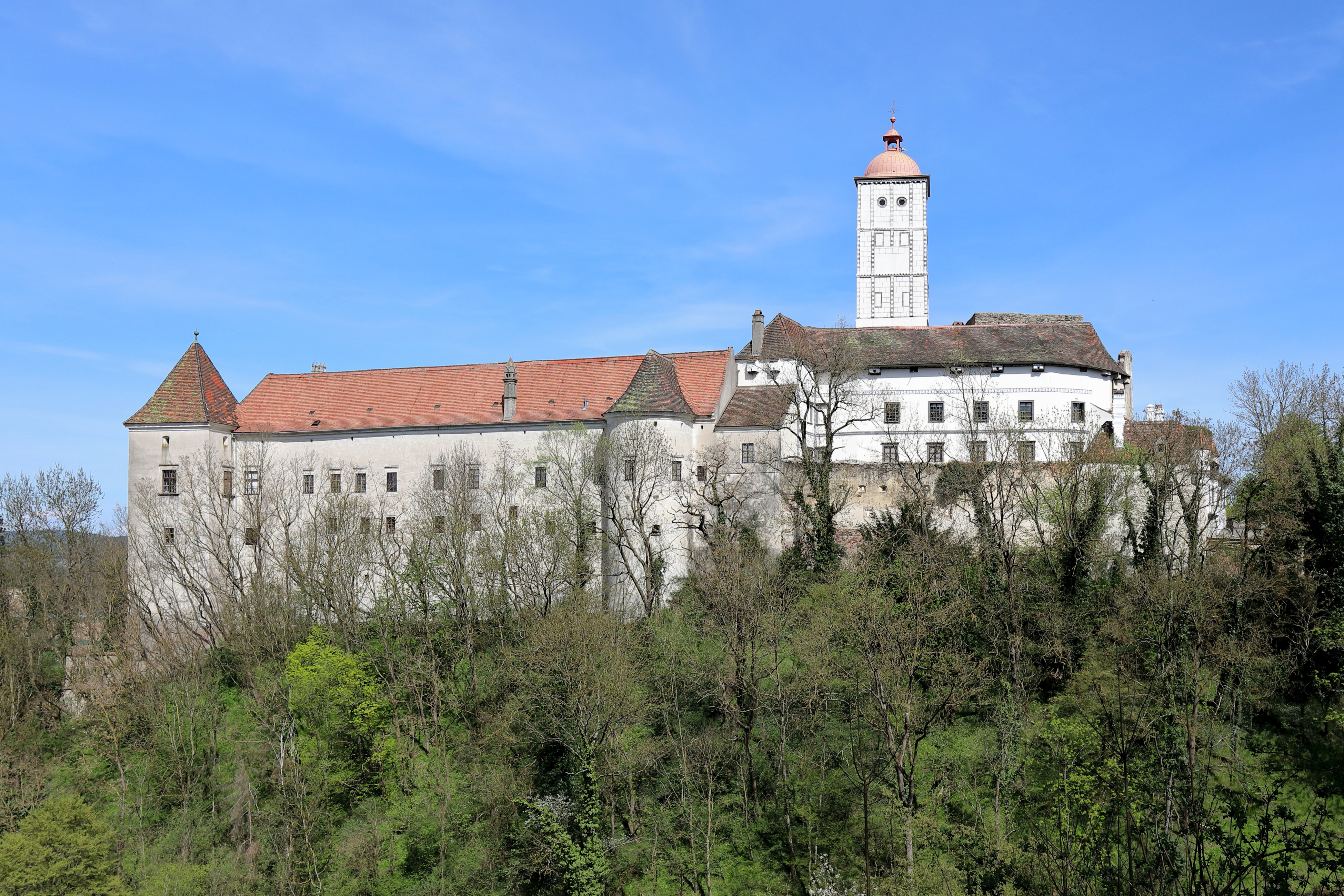 Die Südwestansicht des Schlosses Schallaburg in Schallaburg, ein Ortsteil der niederösterreichischen Gemeinde Schollach. Graf Sighard von Schala der Jüngere ließ die Schallaburg in der 1. Hälfte des 12. Jahrhunderts errichten. Im 13. bis 15. Jahrhundert erfolgten Zubauten wie beispielsweise die gotische Kapelle. Unter Christoph II. von Losenstein fand ab 1540 der Umbau der Burg zu einem Renaissanceschloss statt. Dabei wurde unter anderem der nördliche Teil der Ringmauer geschliffen und 3 Renaissance-Trakte mit zwei Türmen um einen großen trapezförmigen Hof errichtet.